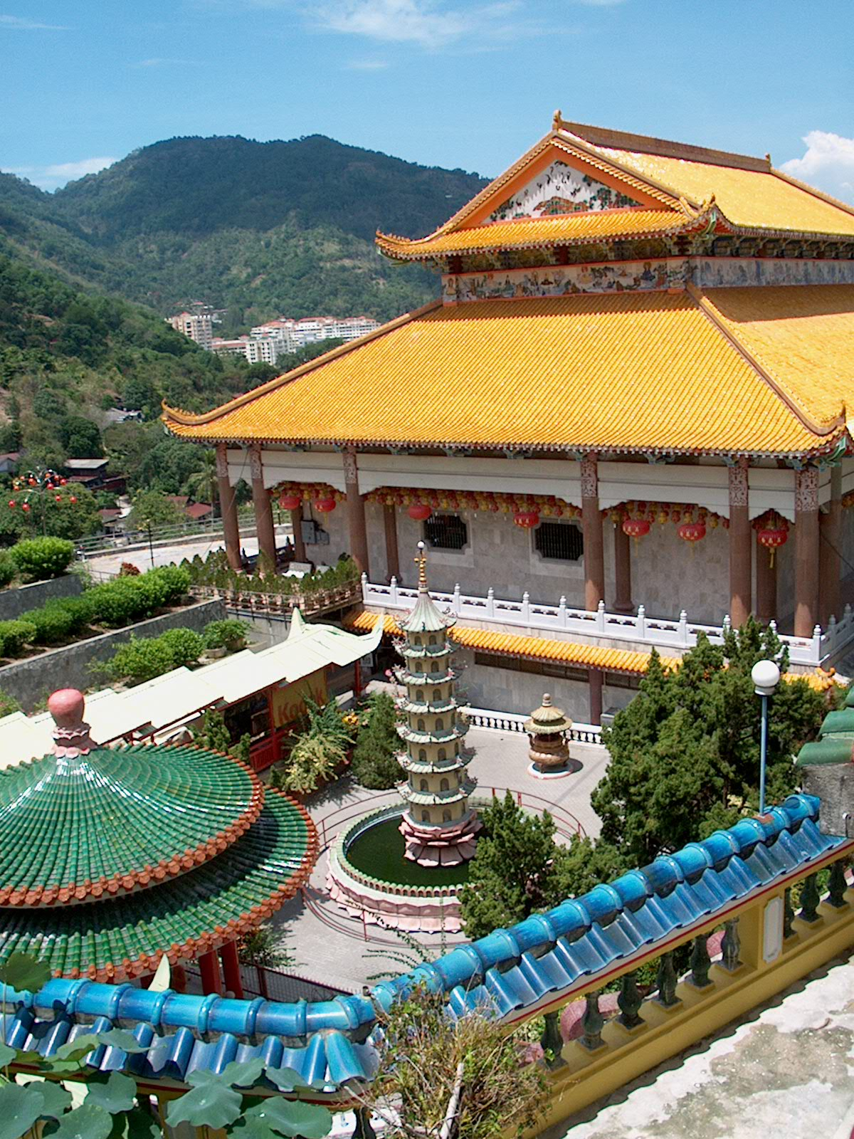 Kek Lok Si Temple, Penang Malaysia